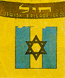 Brigade tag